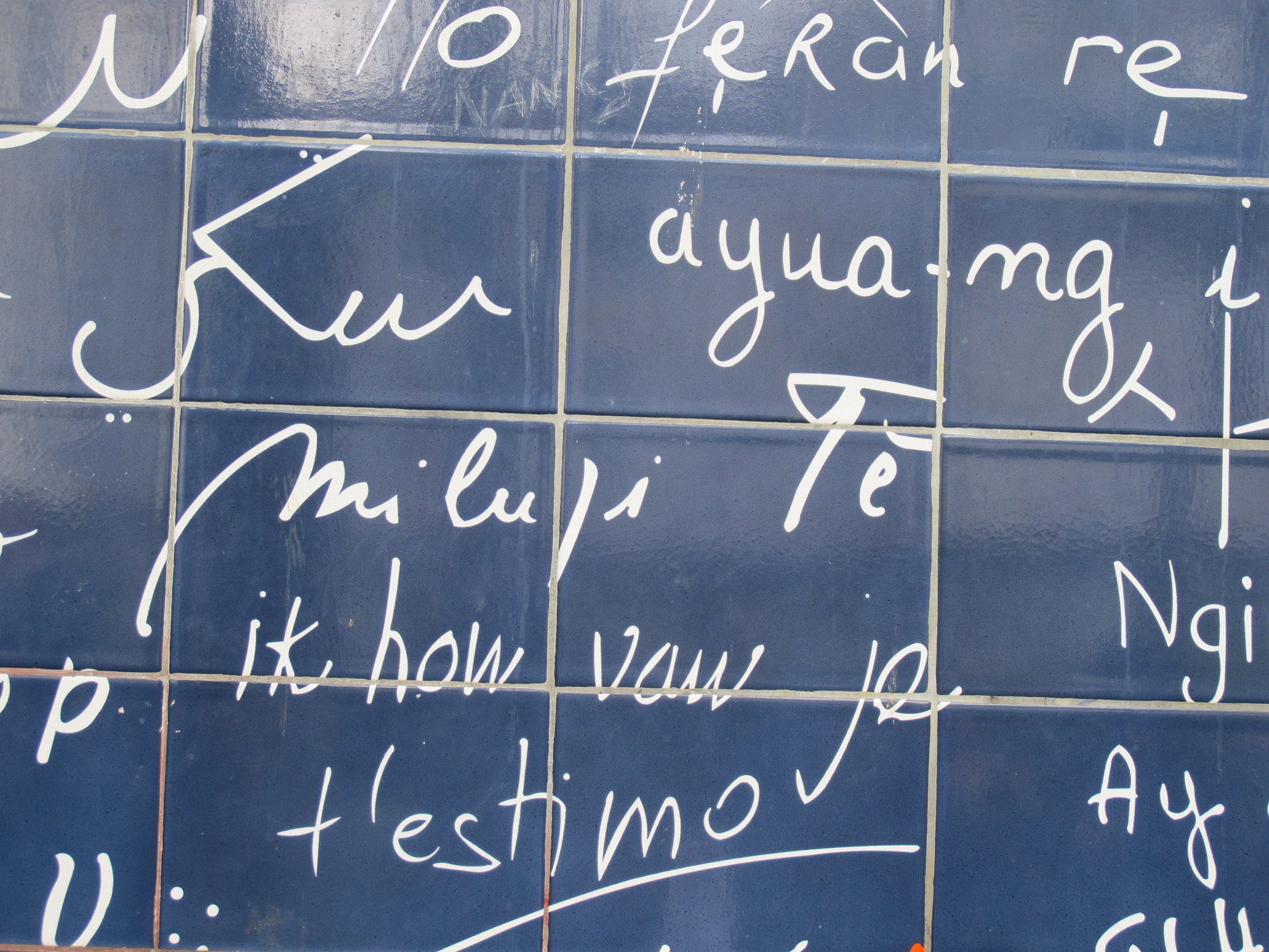 Le mur des je t'aime - inscription tcheque.